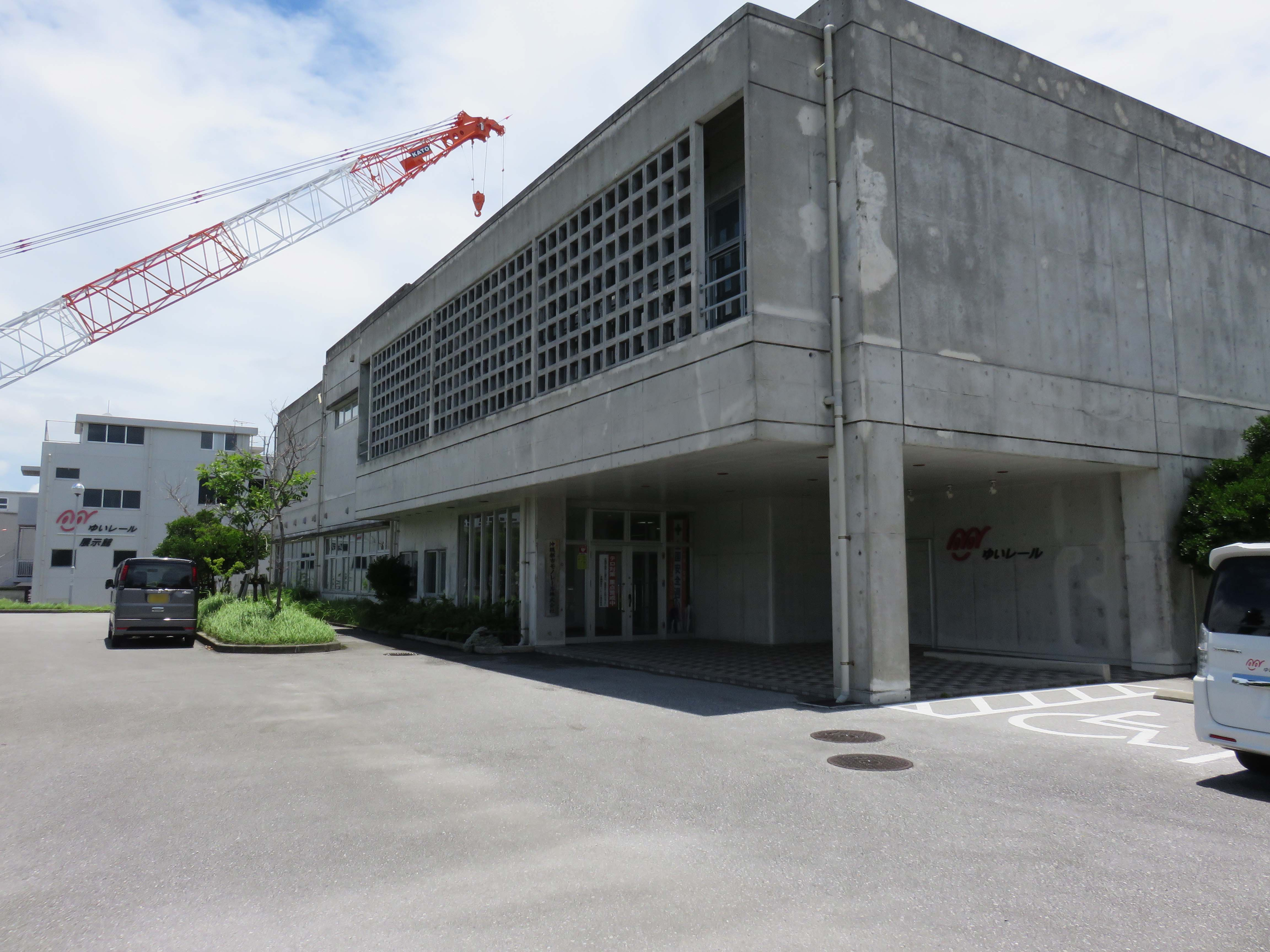 沖縄都市モノレール株式会社本社 右手前が管理棟、左奥が展示棟（ゆいレール展示館） 左に写る自動車のナンバープレートはボカシ加工済み